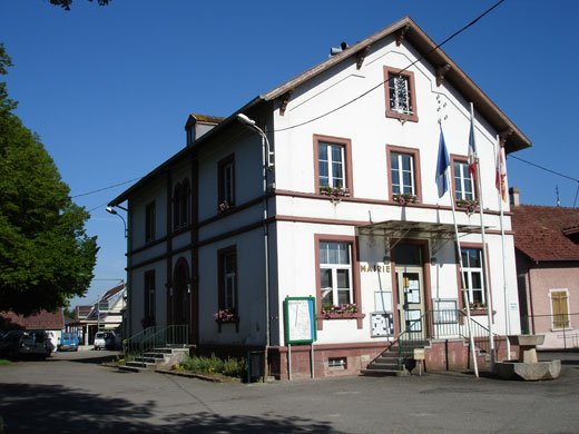 Mairie de Rosenau